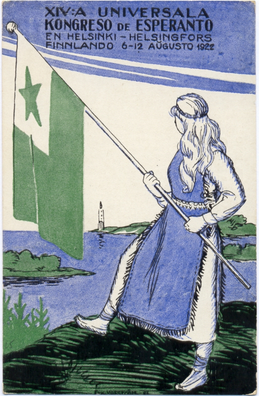 Ansichtskarte zum 14. Esperanto-Weltkongress. Blau und grün kolorierte Zeichnung: Junge Frau mit Esperanto-Flagge